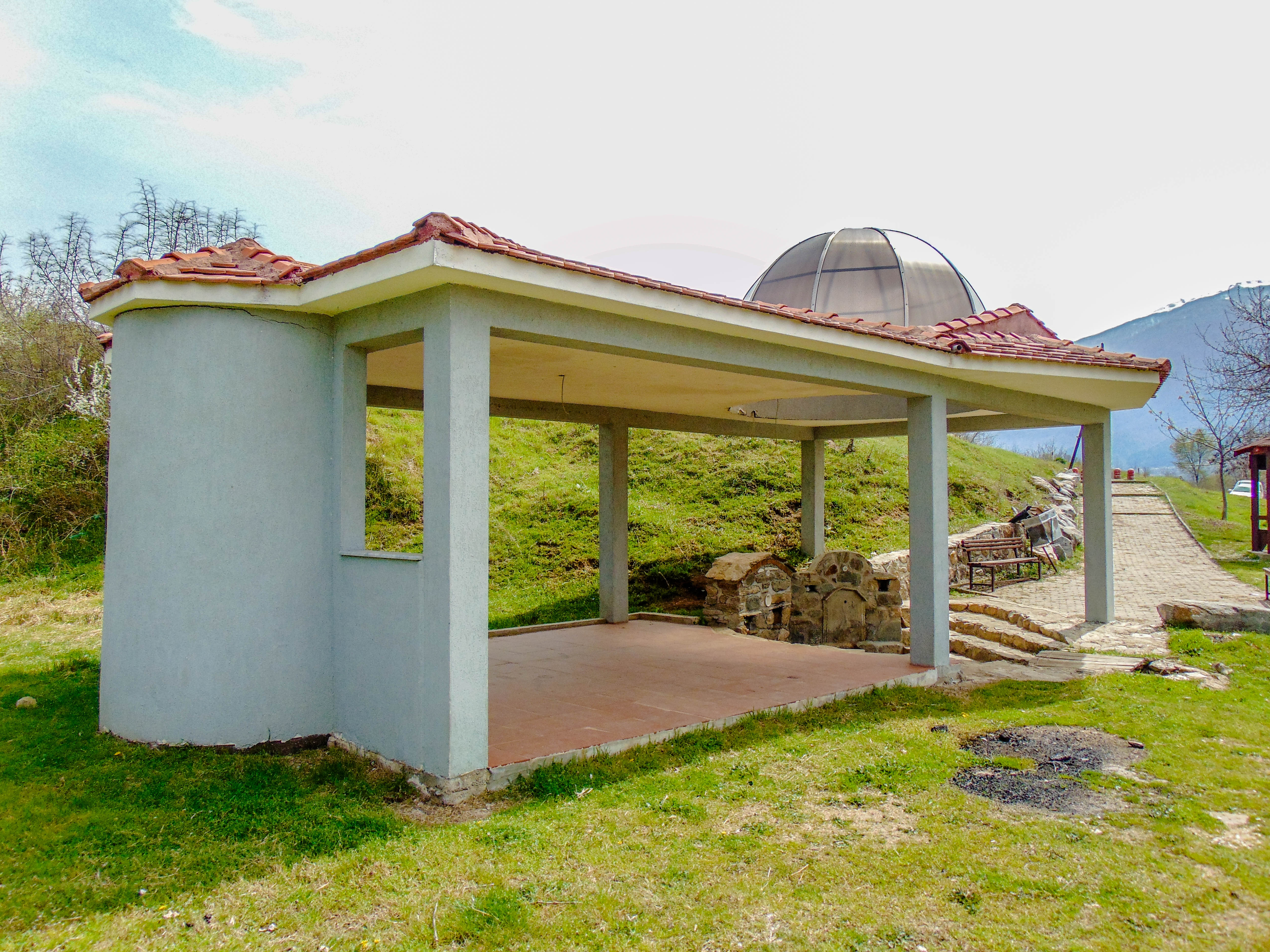 Чешма на Баба Ванѓа - Ново Село